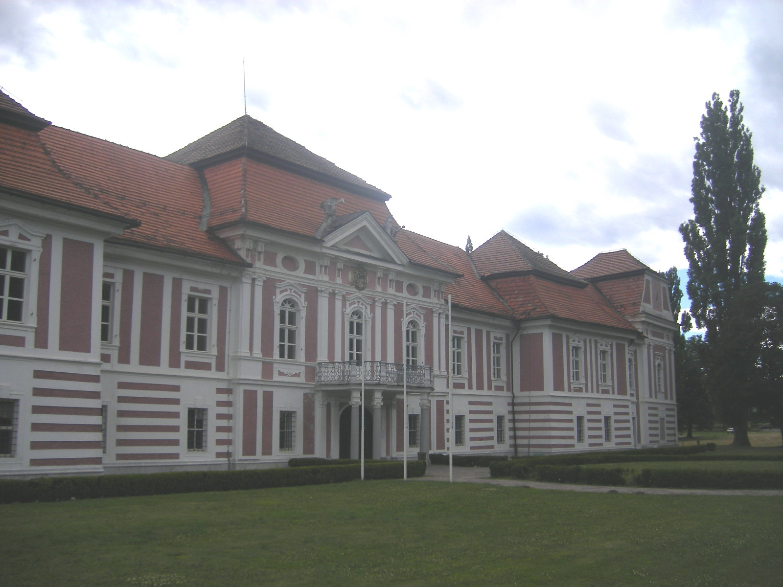 Betnava Castle (Maribor municipality)